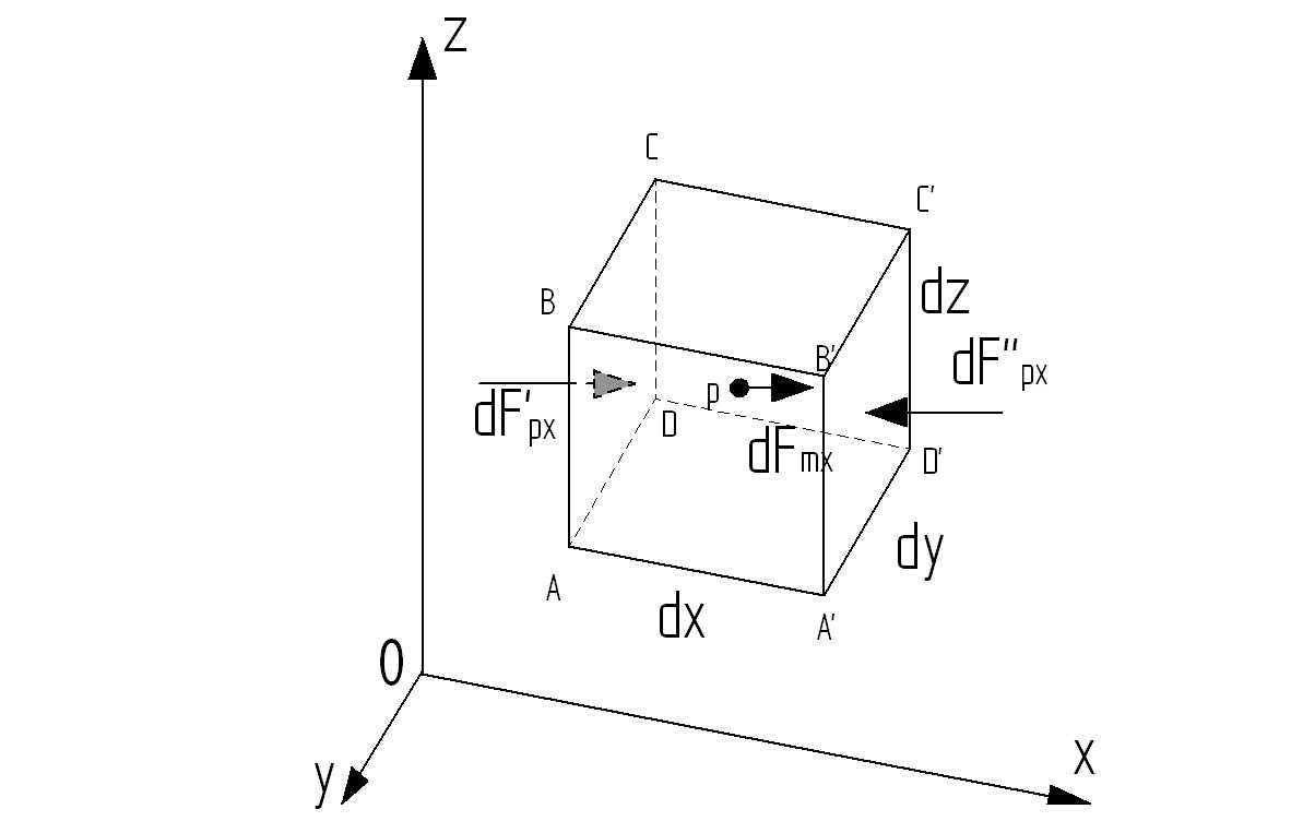 Vedeliku tasakaalu diferentsiaalvõrrandite tuletamine. Punkt p asub kuubi keskel.